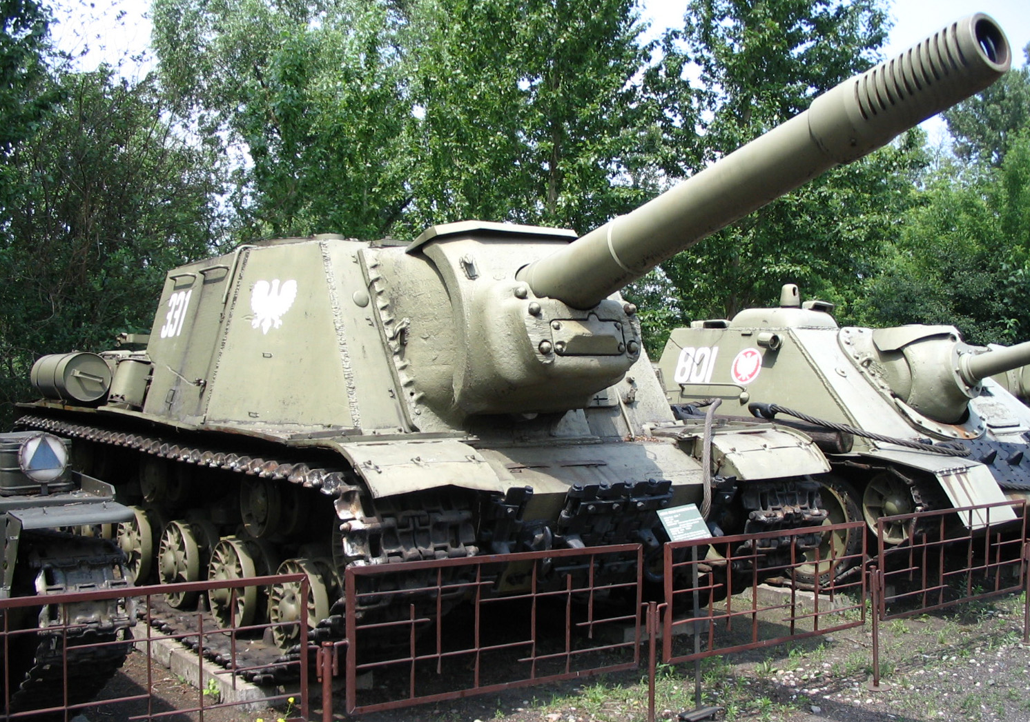 ISU-152 (Muzeum Wojska Polskiego w Warszawie. Polish Army Museum - Warsaw, Poland)